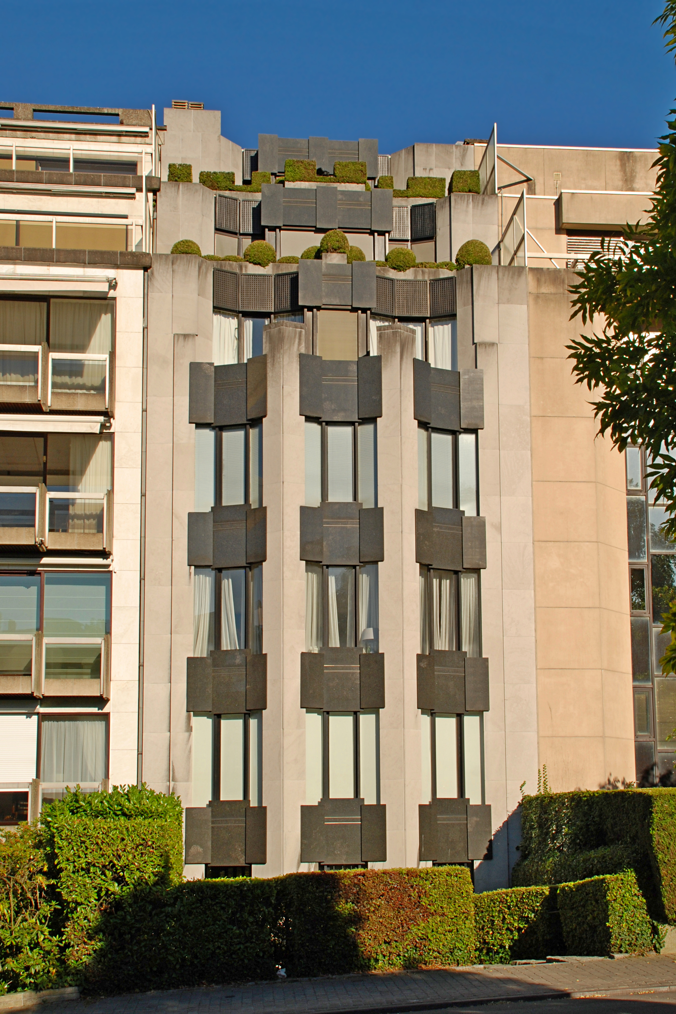 Belgique - Bruxelles - Rue de Belle-Vue 24 (Atelier de Genval - postmodernisme - 1978)